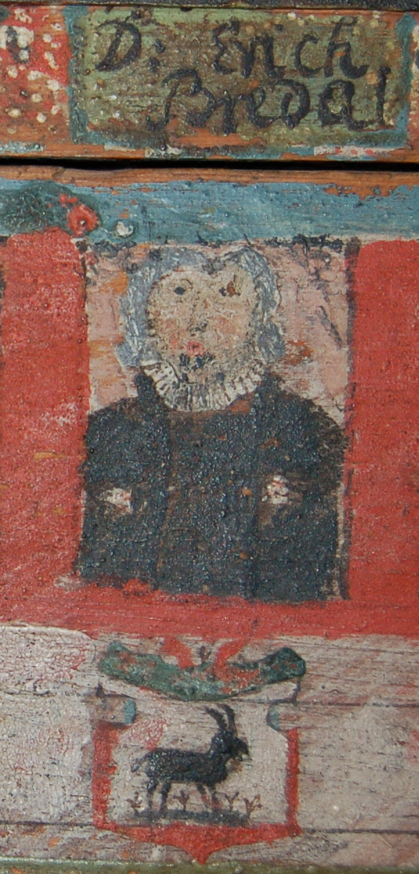 Biskop i Trondheim Erik Bredal, malt av Sigvard Kildal